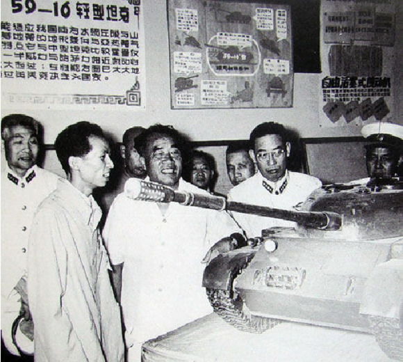 59-16輕型坦克，是1950年代末由北京工业学院设计的轻型坦克方案，后来设计方案未被采纳。